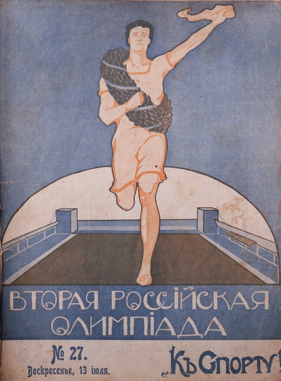 Обложка журнала "К спорту!" 1914 №27